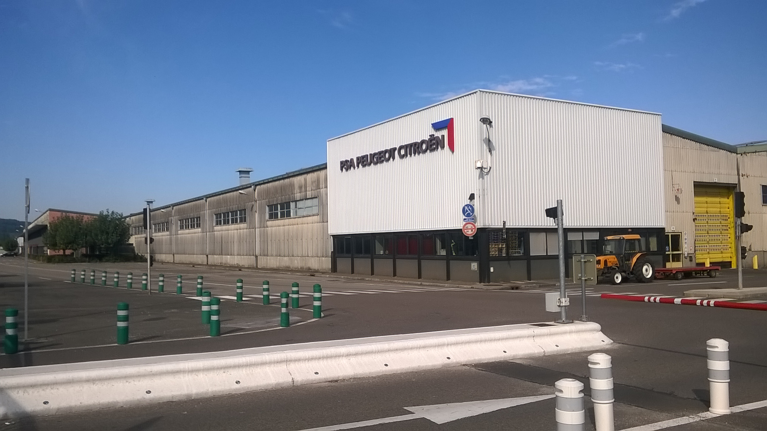 L'entrée sud de l'usine PSA de Vesoul (Haute-Saône)